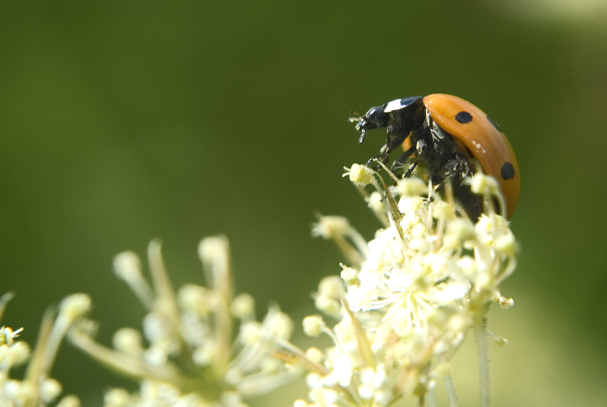 ladybugs